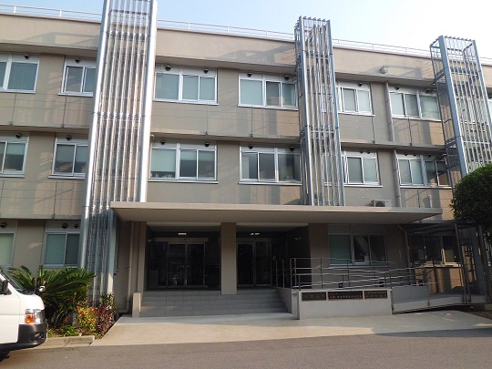 長崎大学水産学部棟